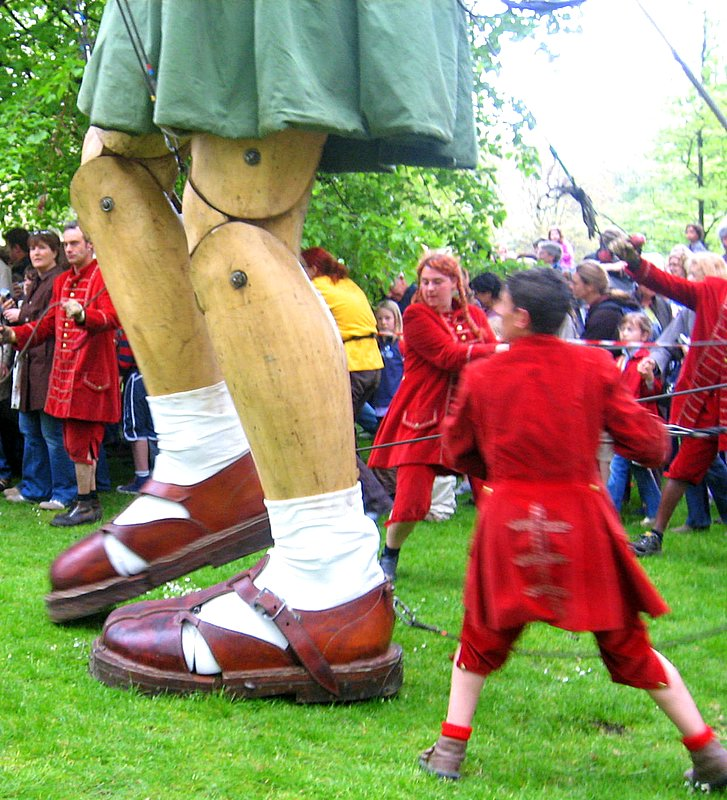 La Petite Géante, de la troupe "Royal de Luxe" (en parade à Londres, en mai 2006). On remarque tout le "travail physique" des laquais chargés d'animer, de déplacer la marionnette (en tirant sur des cordes ou des cables). (A la date de l'import depuis Flickr par Marc ROUSSEL, l'auteur n'avait ni légendé ni commenté sa photo.)